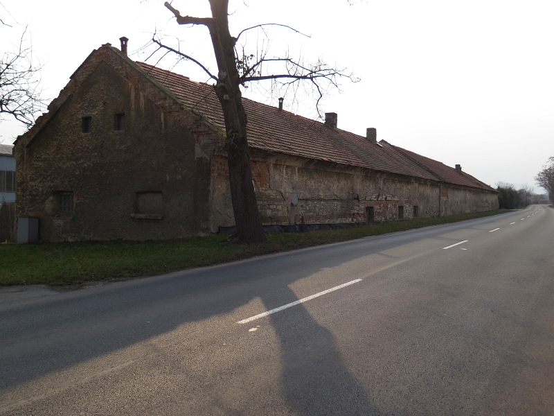 Zámek, z toho jen: hospodářská budova, fragment ohradní zdi Třeboutice, Třeboutice 1, Třeboutice.